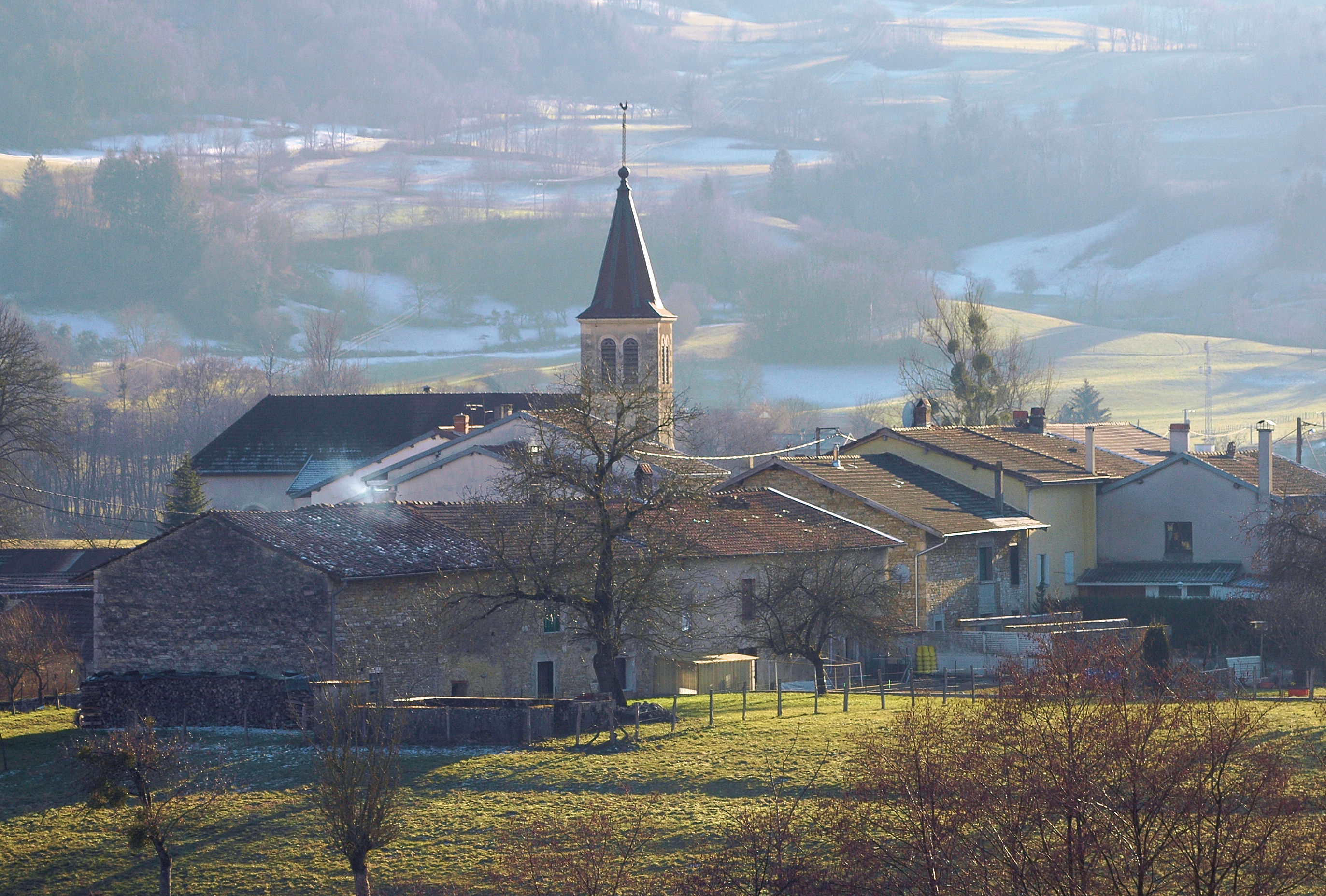 Village de Cornod